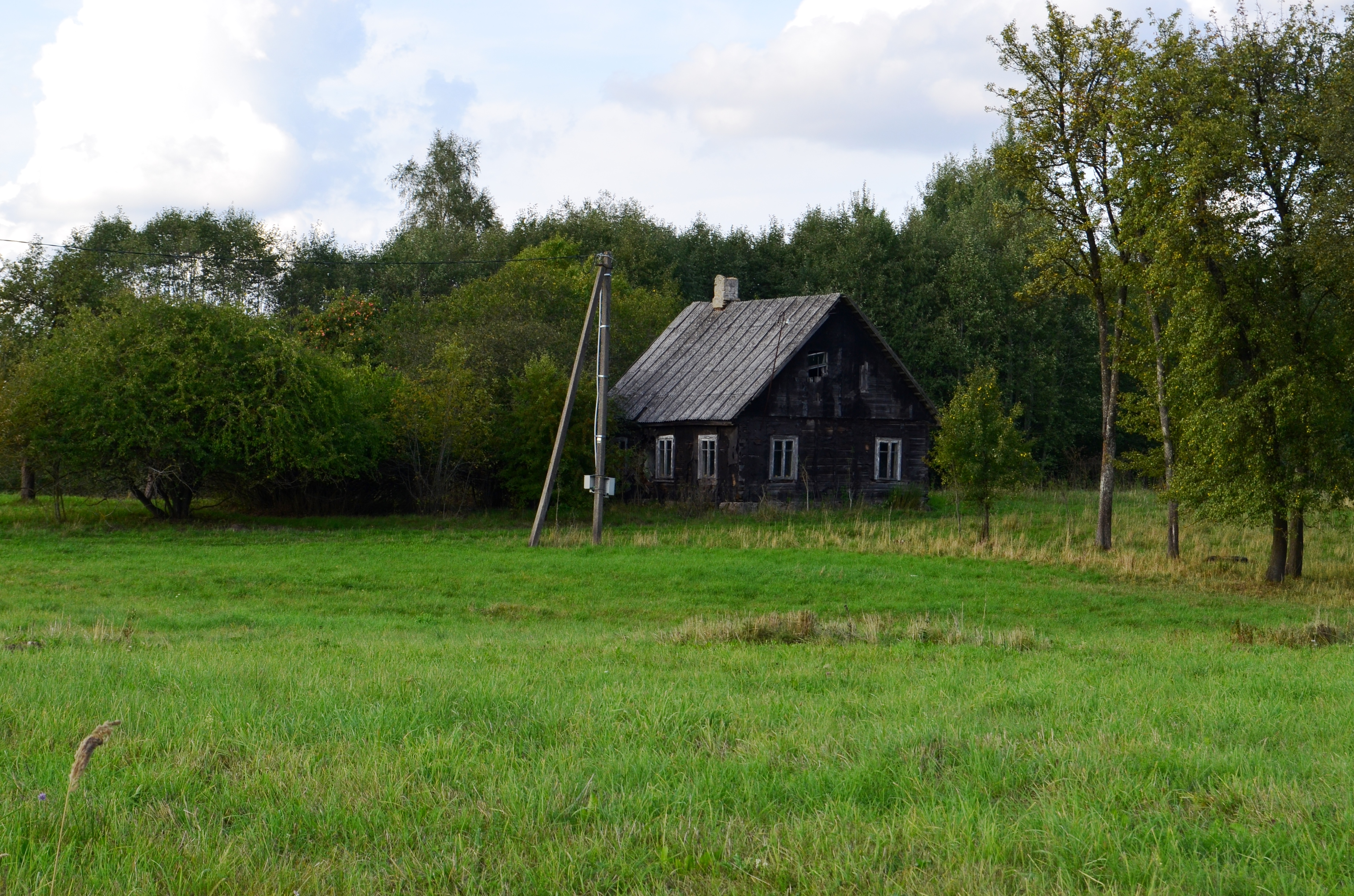 Mažuoliai, Radviliškio raj.